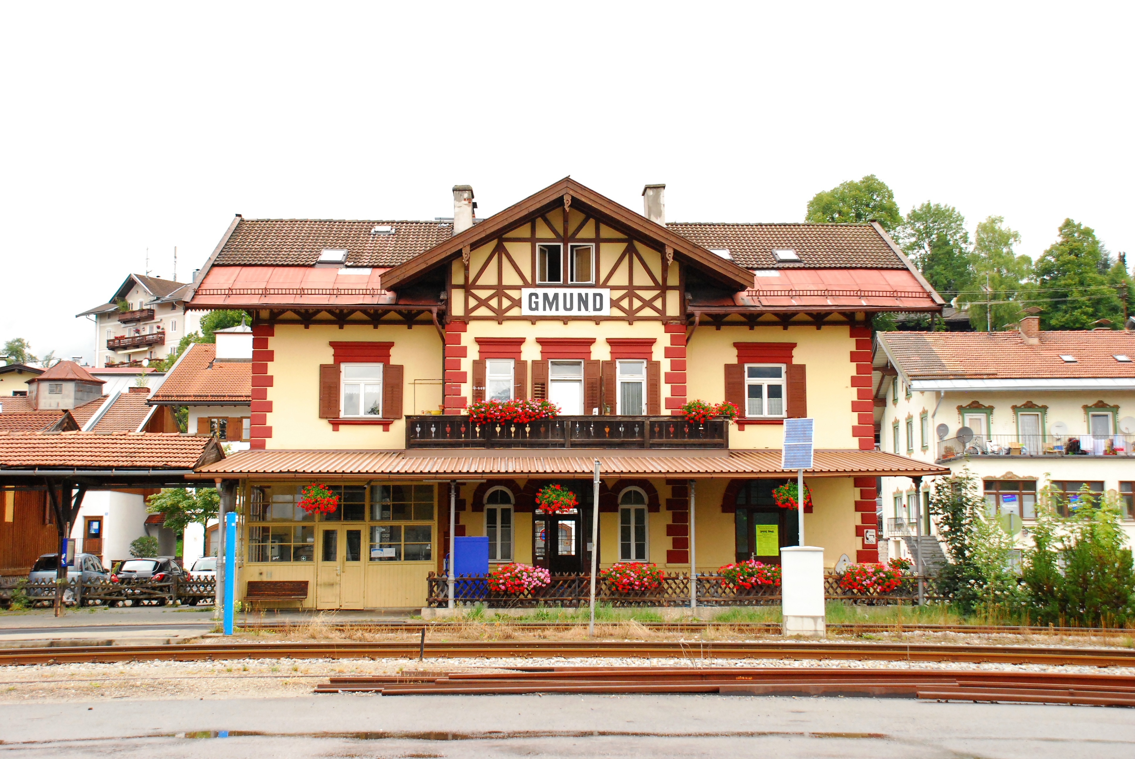 Bahnhof (Gleisseite) in der Wiesseer Straße 11 in Gmund am Tegernsee, Landkreis Miesbach, Regierungsbezirk Oberbayern, Bayern. Als Baudenkmal in der Bayerischen Denkmalliste aufgeführt. Laut Gebäudetafel im Jahr 1883 erbaut.